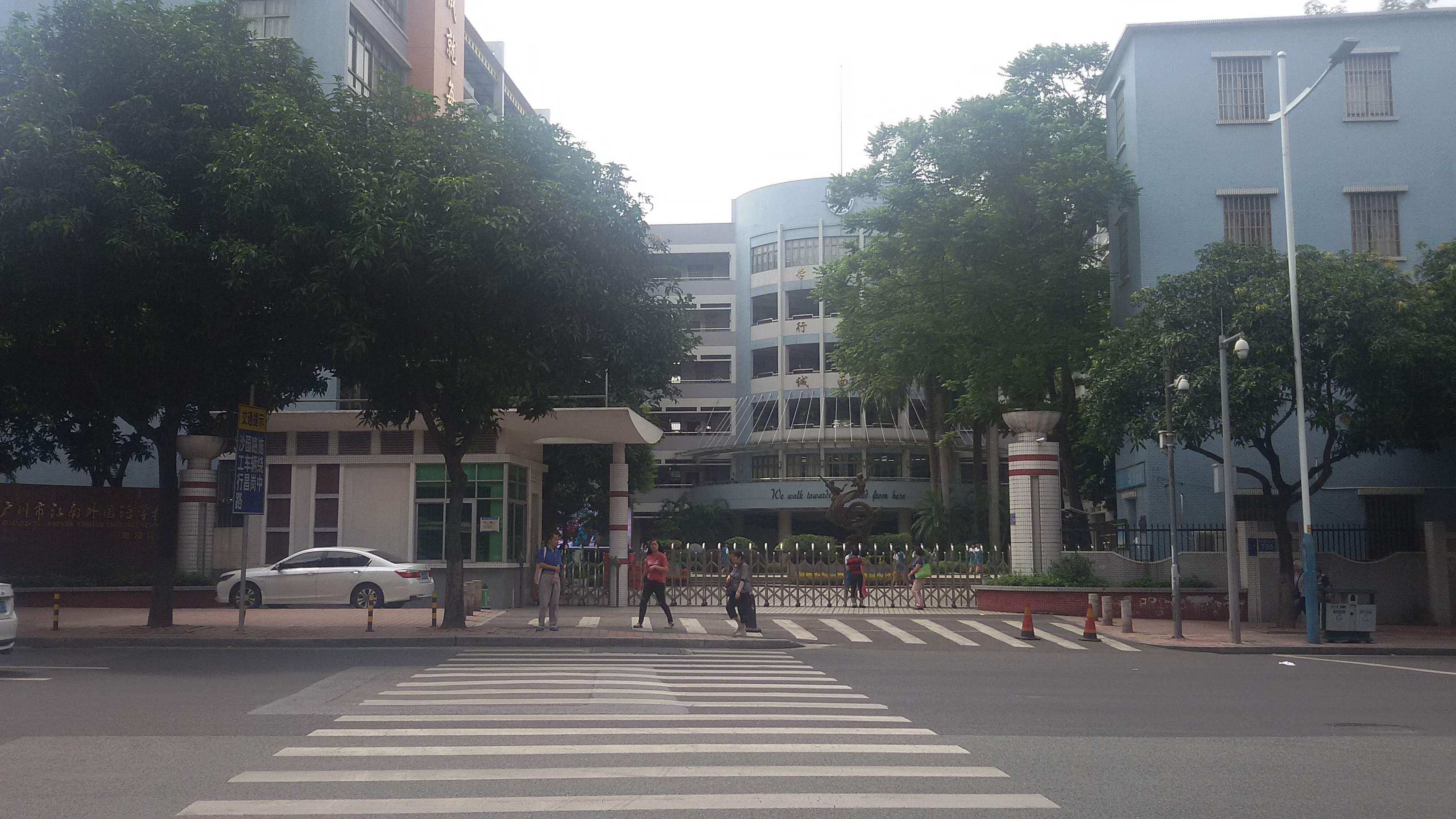 粵語: 廣州市江南外國語學校嘅南校區門口